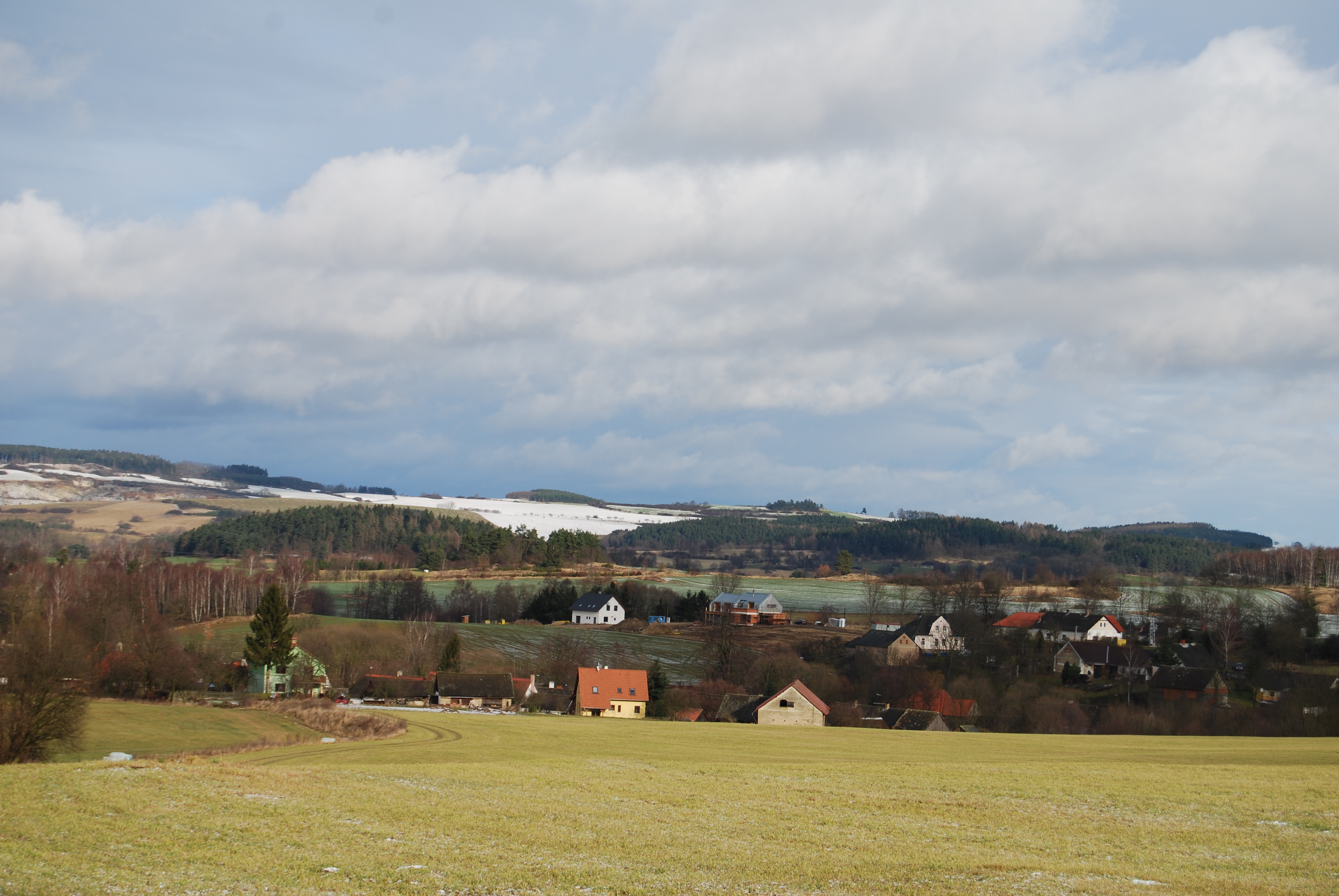 Pohled na okolí obce . Kojetín (Petrovice). Okres Příbram. Česká republika.